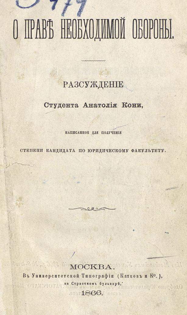 Титульный лист монографии "О праве необходимой обороны". Автор: А. Ф. Кони, издана в 1866 году